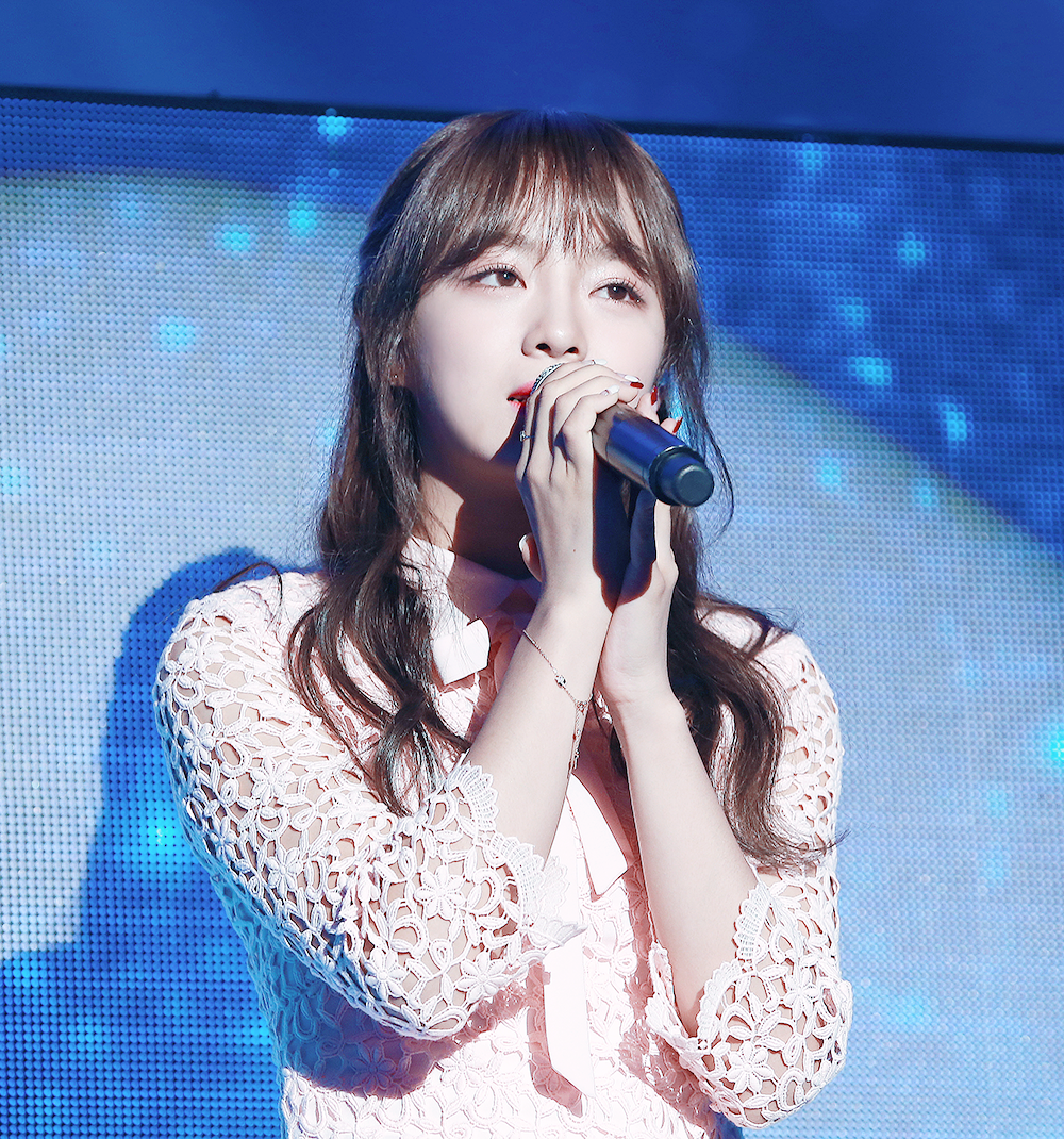 161229 SBS 가요대전 김세정